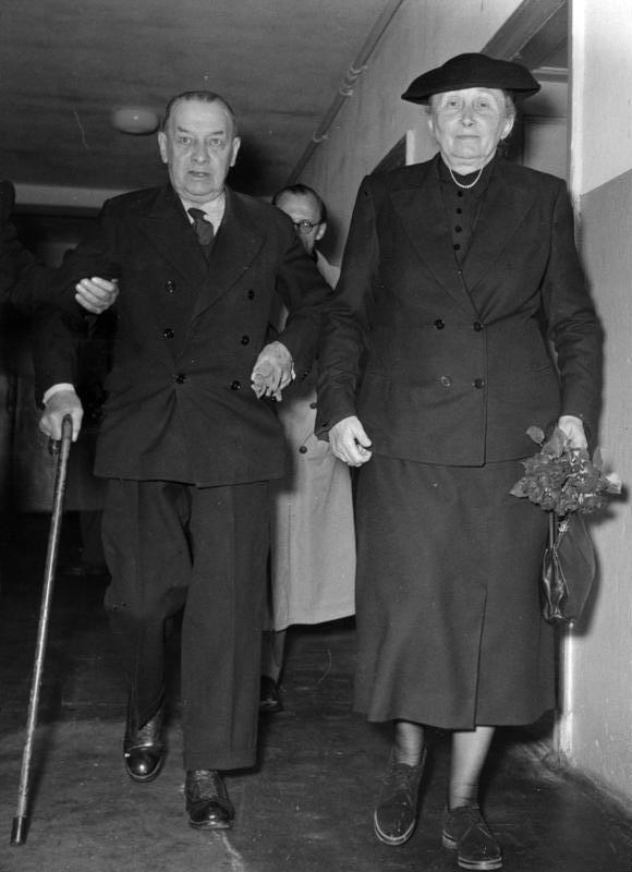 Berlin, Raeder mit Ehefrau Zentralbild/25 25.11.1958 Erich Raeder aus der Spandauer Haft entlassen Der ehemalige Großadmiral der deutschen Kriegsmarine, Dr. h.c. Erich Raeder, 79 Jahre alt, wurde am 26.9.1955 aus dem Spandauer Gefängnis entlassen. Raeder war am 1.10.1946 von dem Internationalen Gerichtshof in Nürnberg zu lebenslänglicher Haft verurteilt worden. UBz: Erich Raeder mit seiner Frau nach der Gefängnisentlassung im Bürger-Hospital in Berlin-Charlottenburg. Abgebildete Personen: Raeder, Erich: Großadmiral, Oberbefehlshaber der Kriegsmarine, Deutschland (PND 118743511)